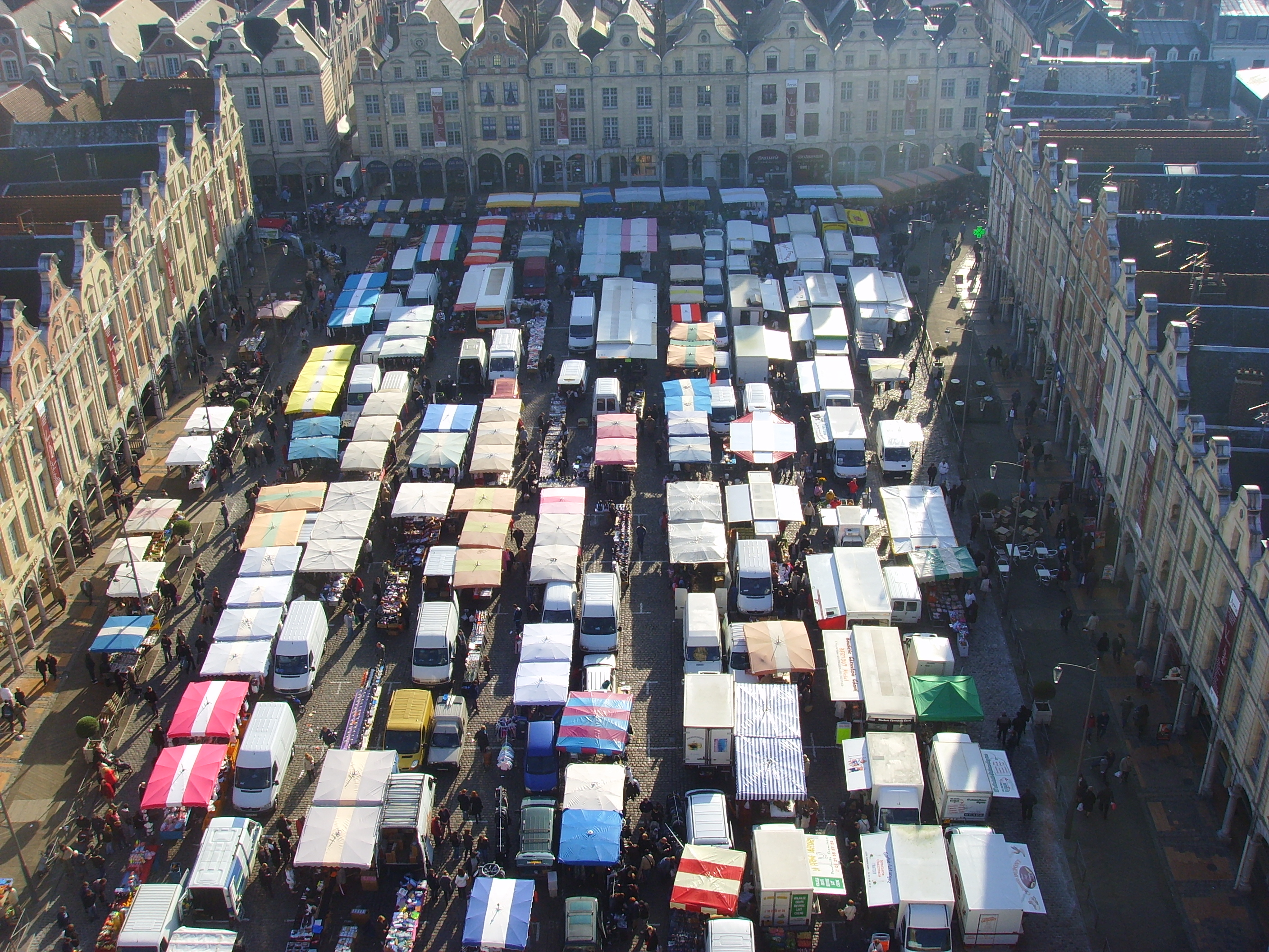 Marktplatz von Arras (Petit Place).